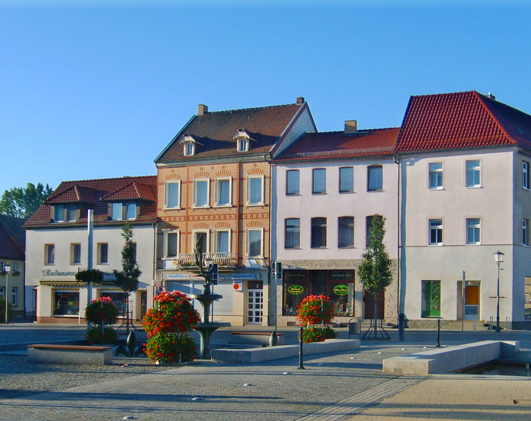 Der Elsterbrunnen auf dem Elsterwerdaer Markt im Juni 2011.